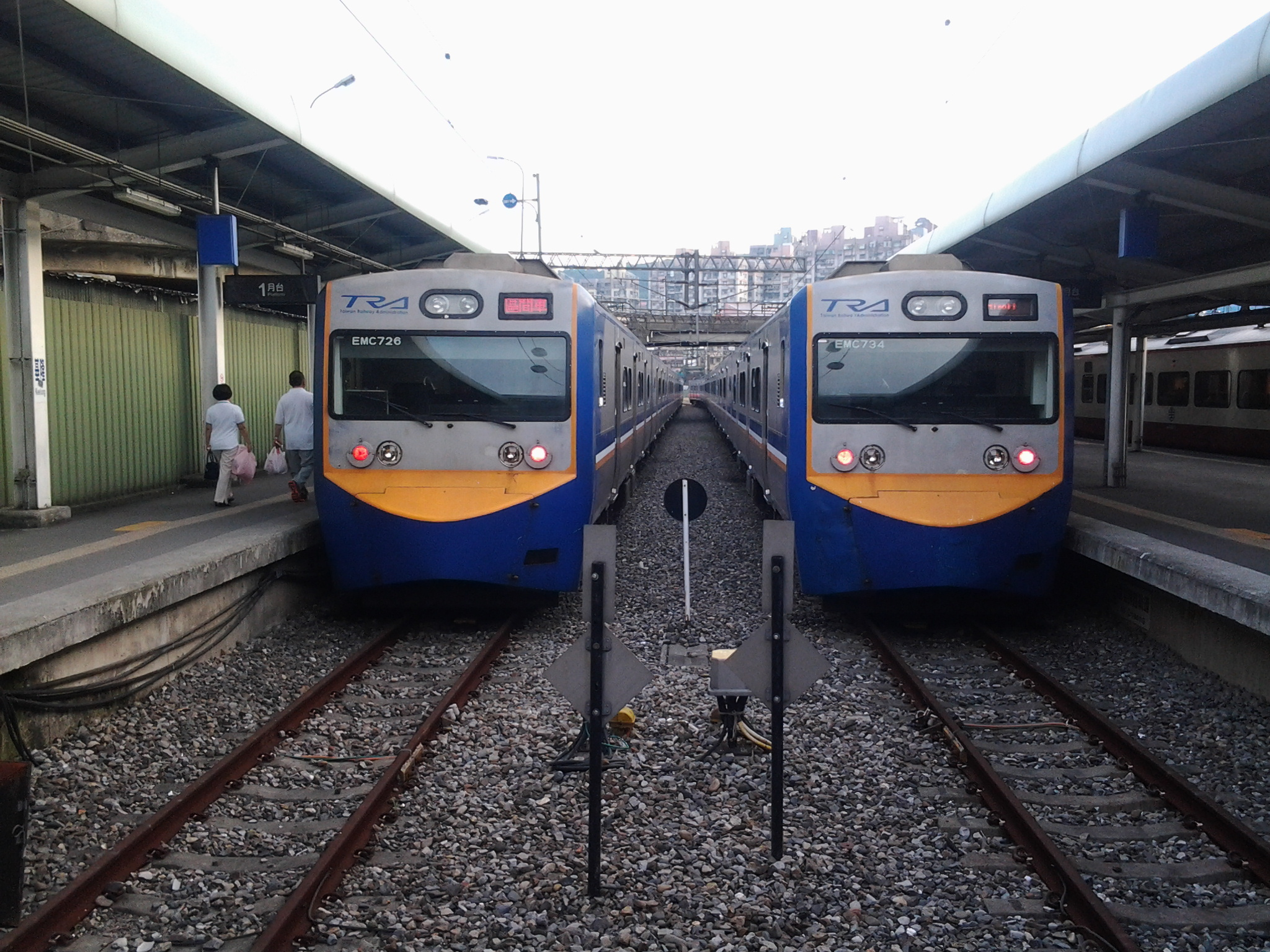 臺灣鐵路管理局EMU700型電聯車EMC726與EMC734，停在基隆車站終端式月台。